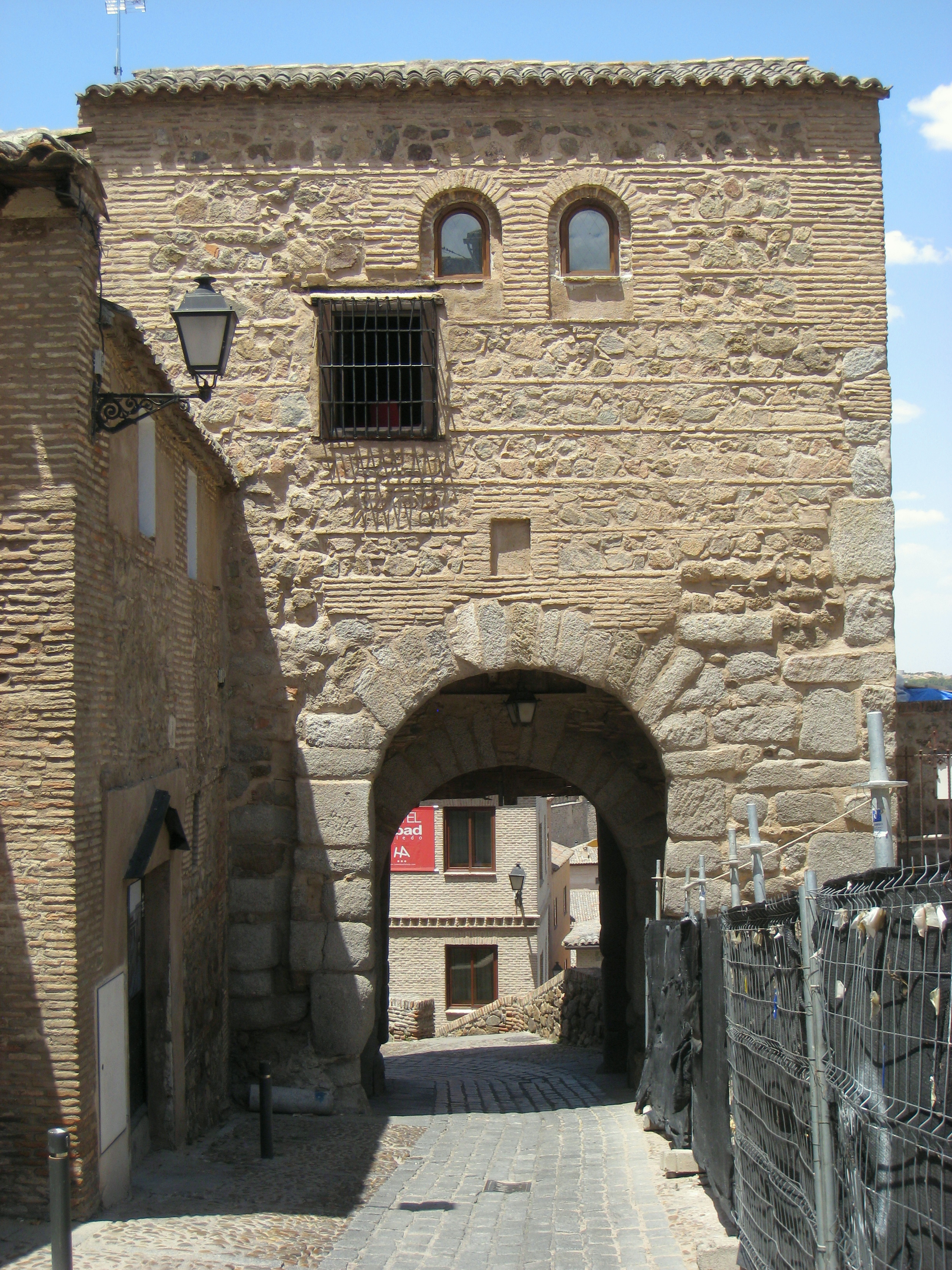 Puerta de Valmardón (Puerta Bab al-Mardum), Toledo, Spain.